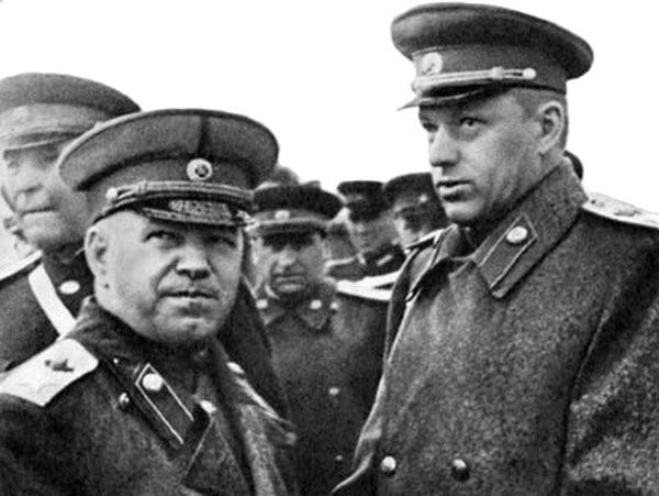 I marescialli dell'Unione Sovietica Georgij Zukov (a sinistra) e Konstantin Rokossovskij